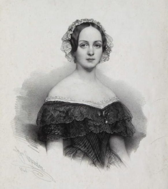 Баронесса Каролина Логиновна Штицлиц, ур. Миллер (1817—1873)